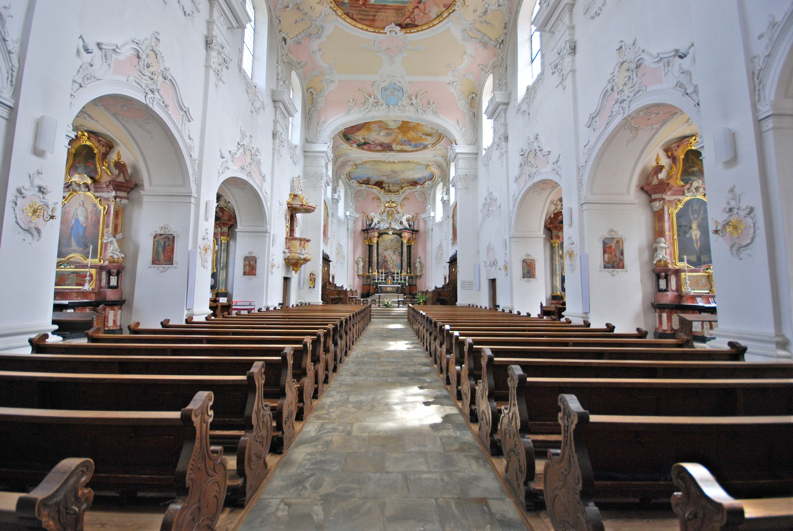 Innenraum des Arlesheimer Doms